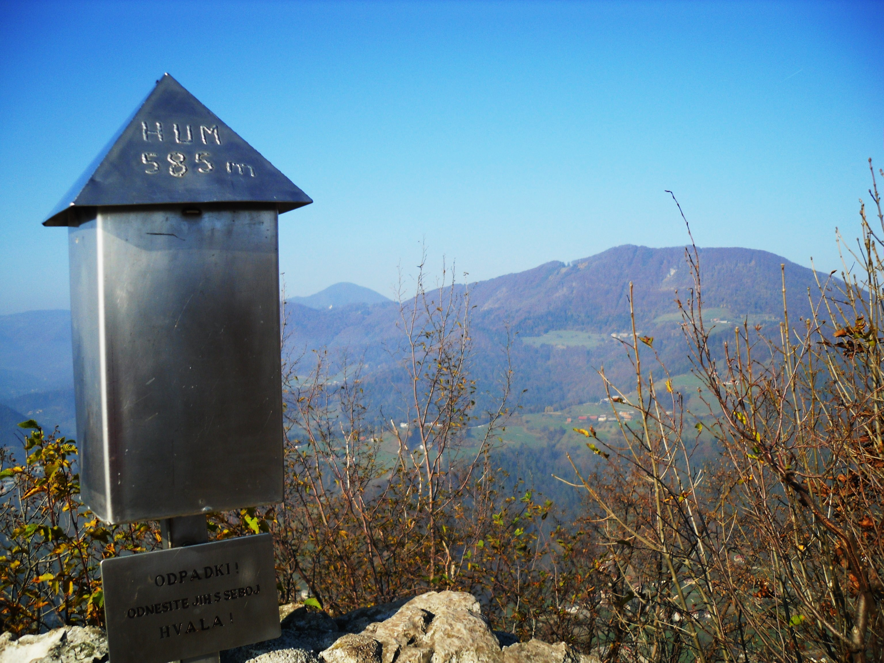 Hum